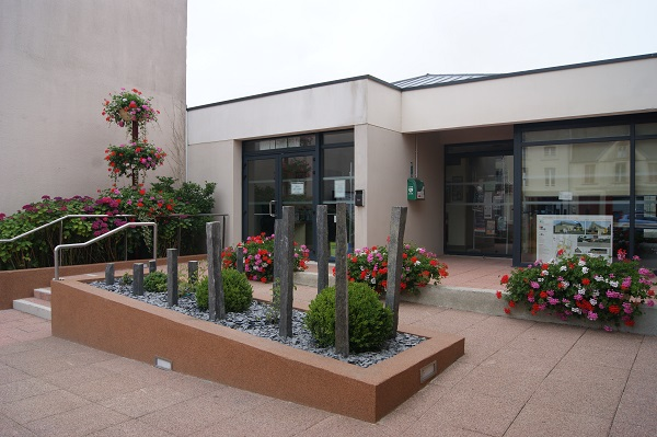 Salle de réunion Espace numérique Espace touristique